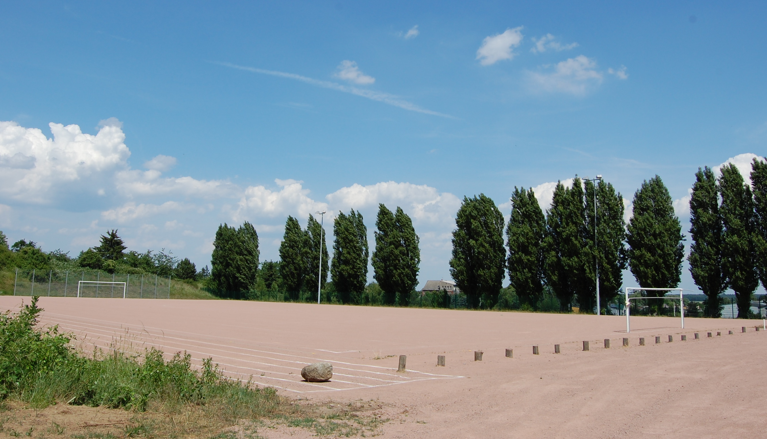 Fussballplatz Tonschacht in Westerhüsen, Blick von Süden